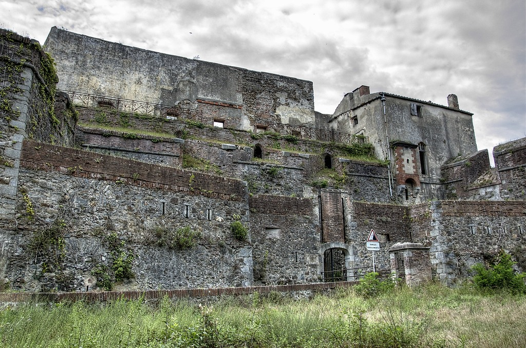 Fort les Bains, Amélie-les-Bains-Palalda (Pyrénées-Orientales, Languedoc-Roussillon, France)